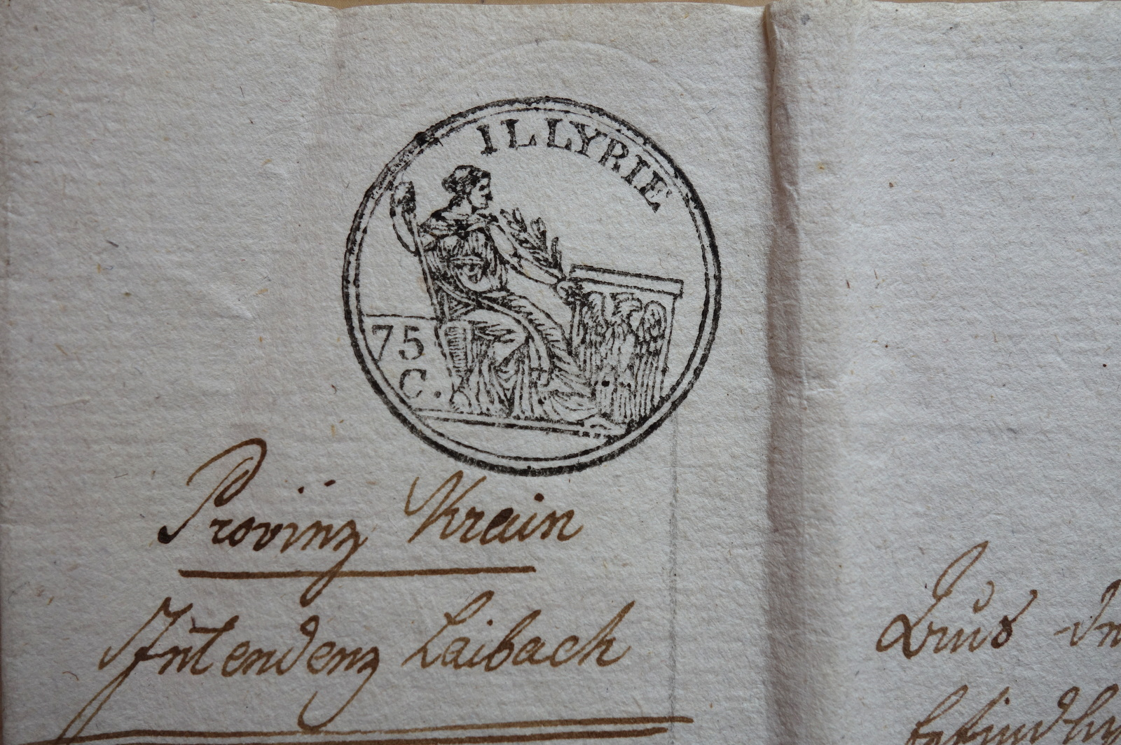 Pisanc, Zgornja Dobrava, dokument iz leta 1814 (2)